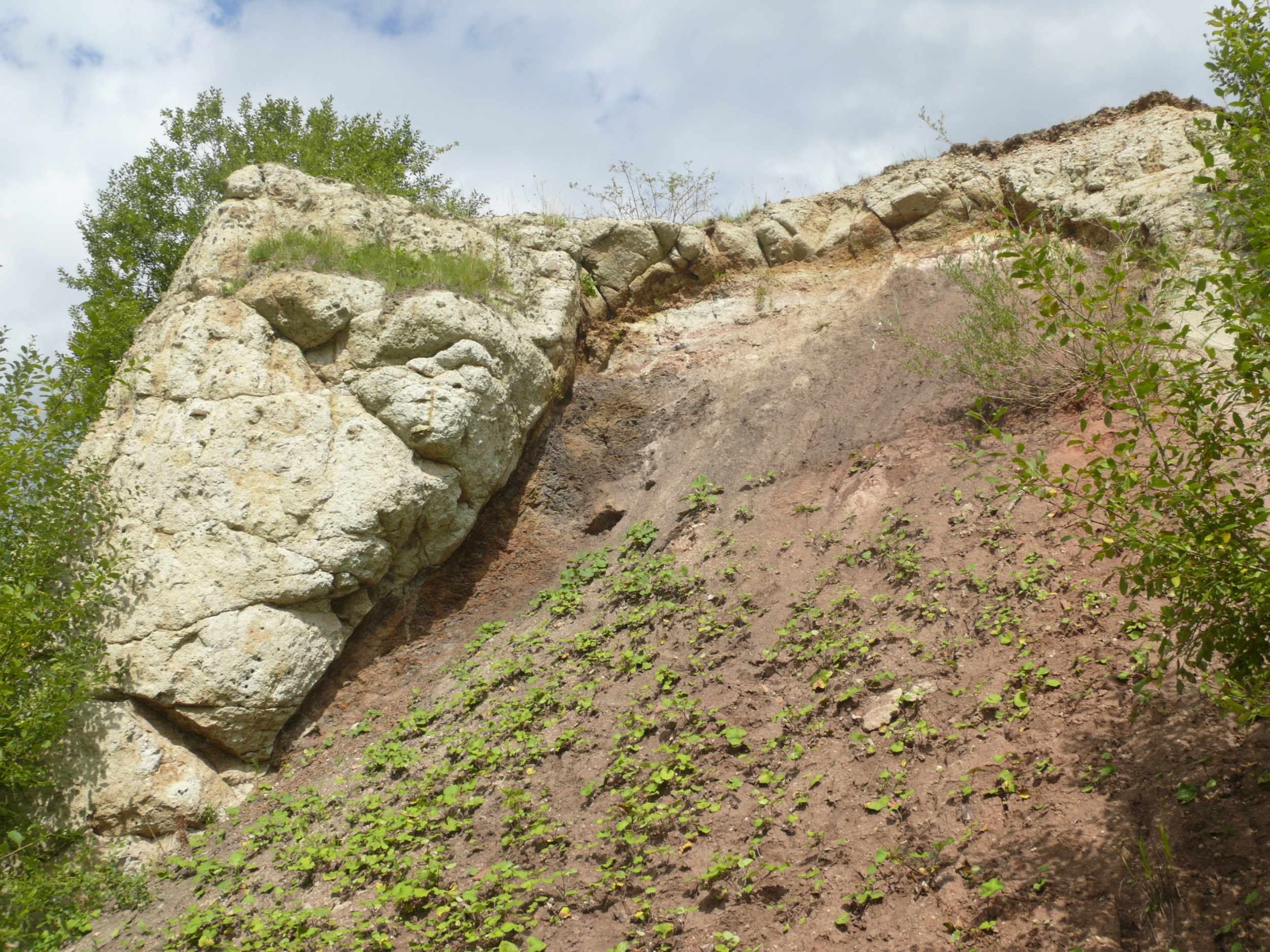 Bunte Breccie und Suevit, Steinbruch Aumühle bei Öttingen